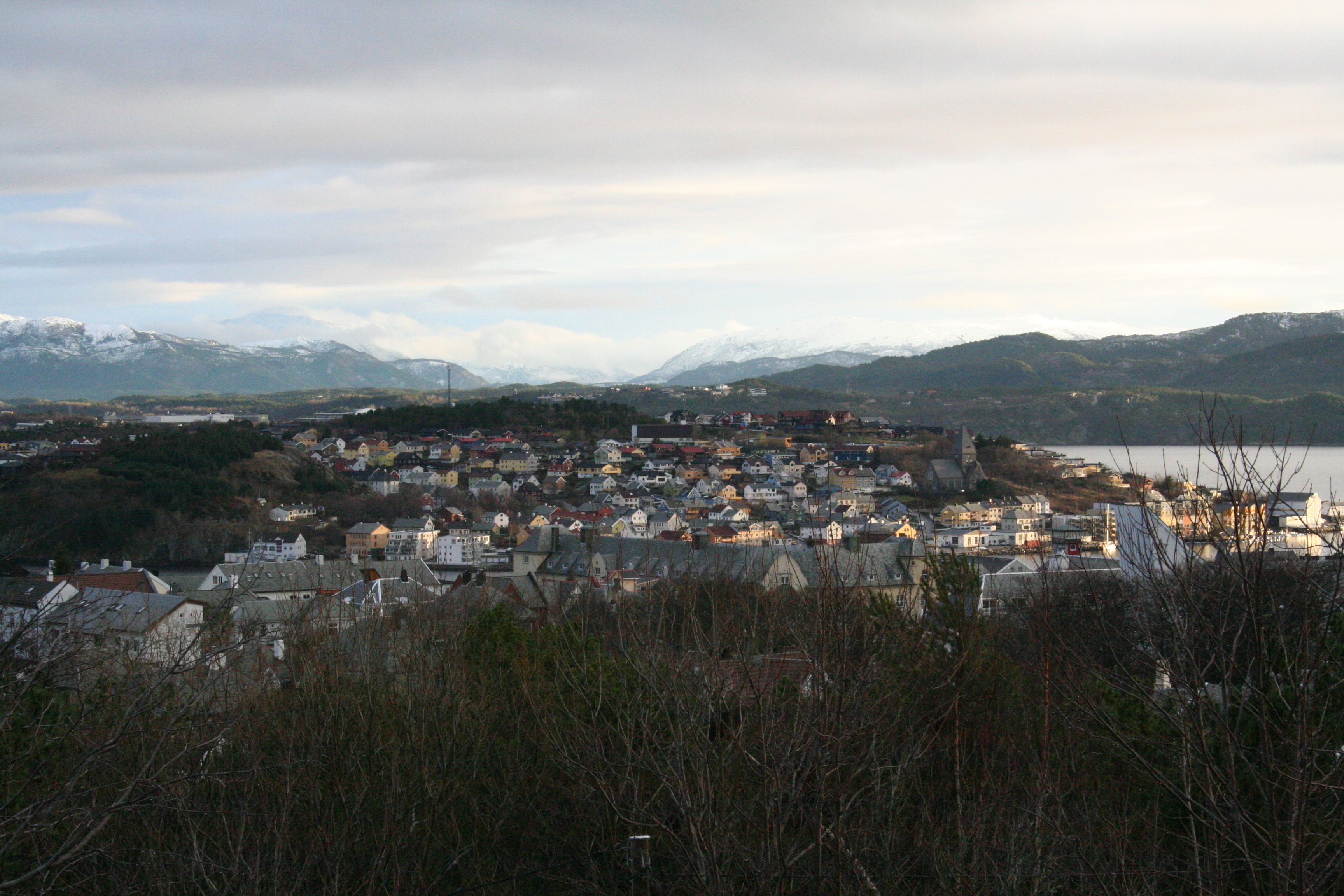 Utsikt mot Kristiansund sentrum fra Varden